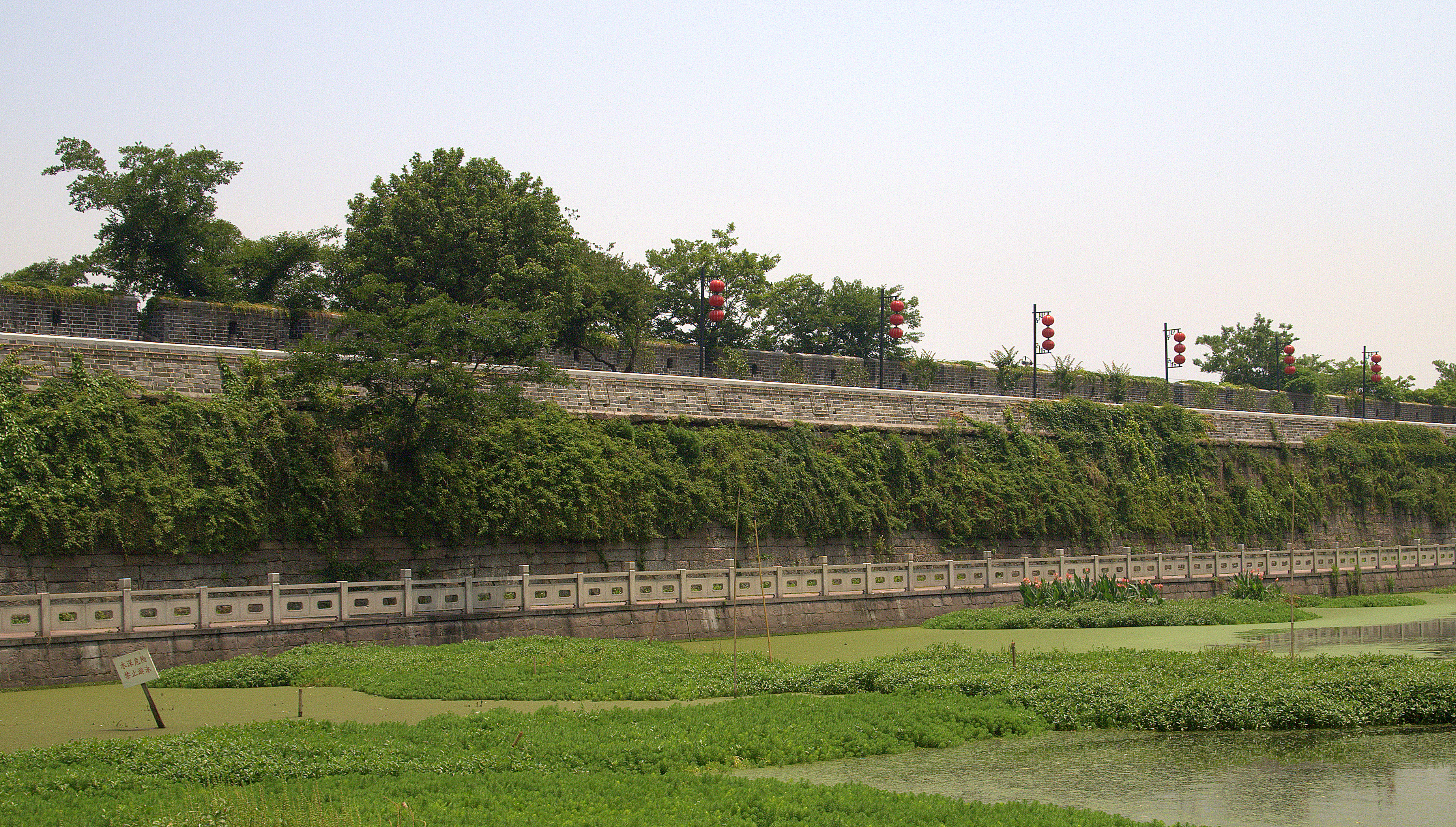 镇海后海塘